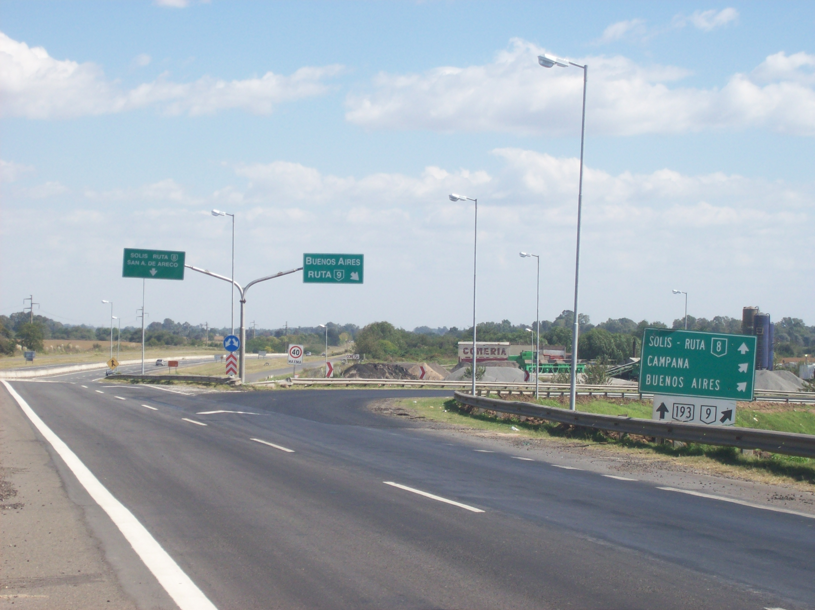 Inicio de la Ruta Nacional 193, en el puente sobre la Ruta Nacional 9 en Zárate, Provincia de Buenos Aires, Argentina.